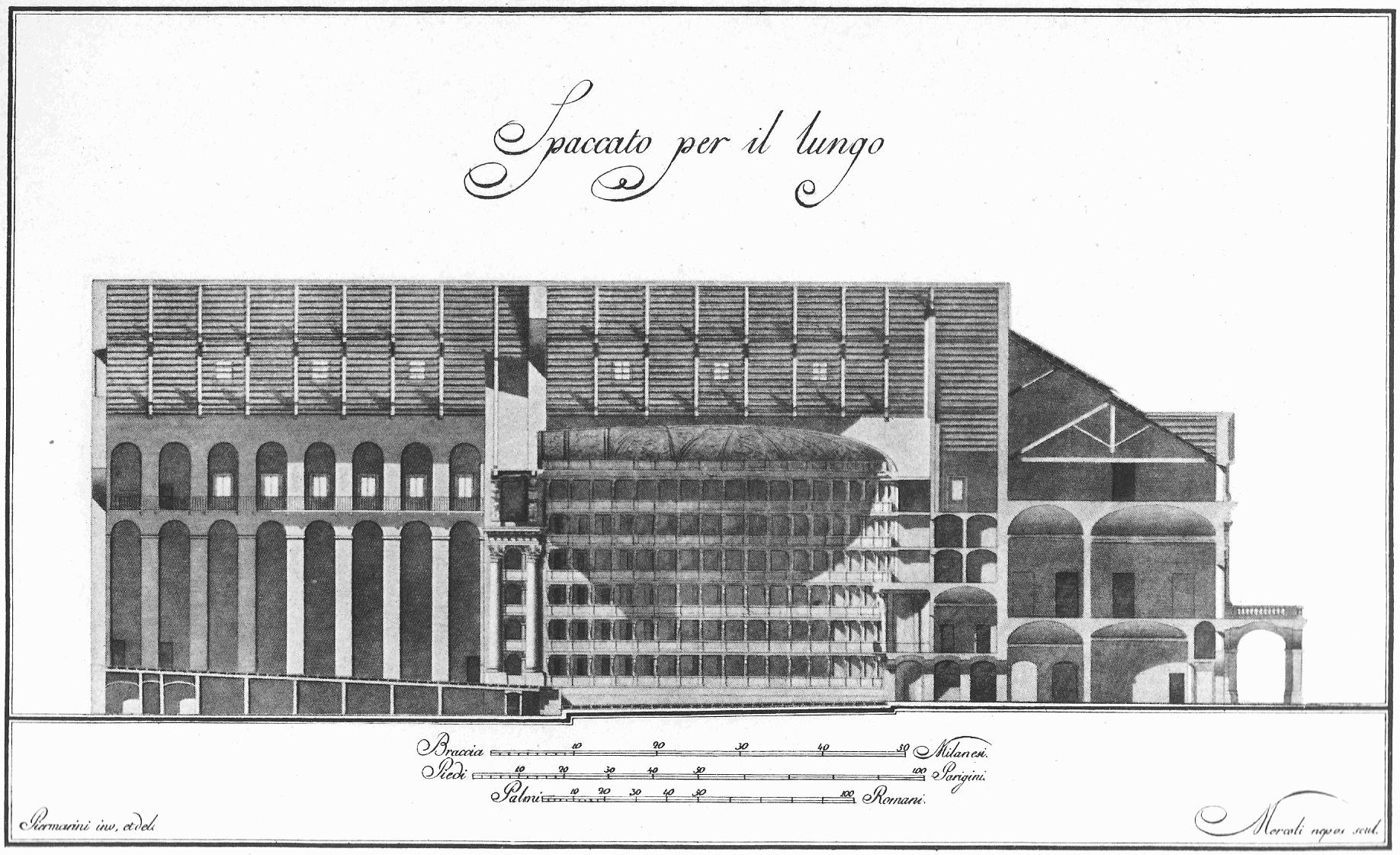 "spaccato per lungo" del teatro alla Scala, "Piermarini inv. et del. Mercoli nepos. scul." incisione su rame, Milano, Museo teatrale della Scala